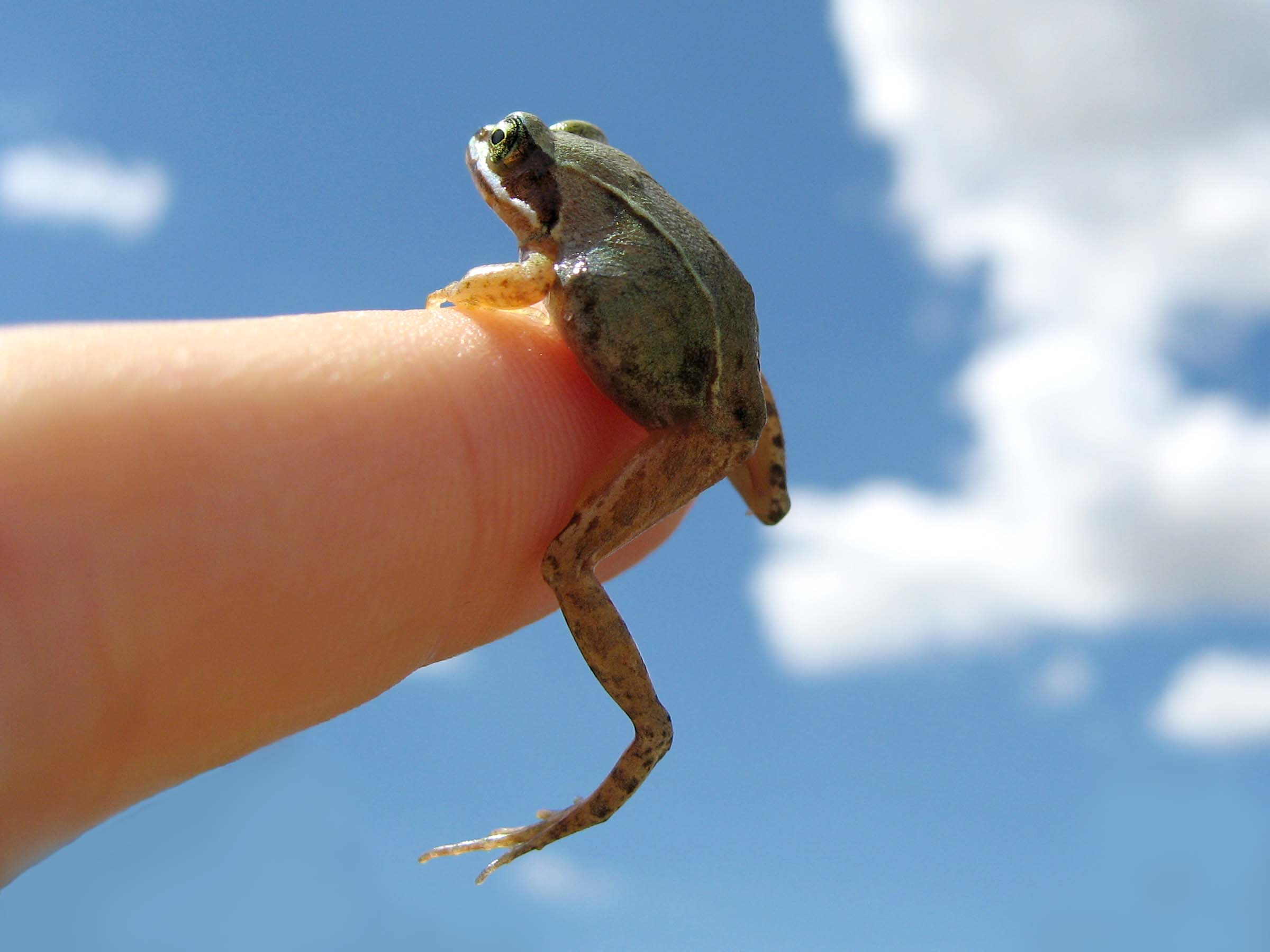 Junger Springfrosch (Rana dalmatina), ca. 2 cm lang, auf einem Finger zum Größenvergleich